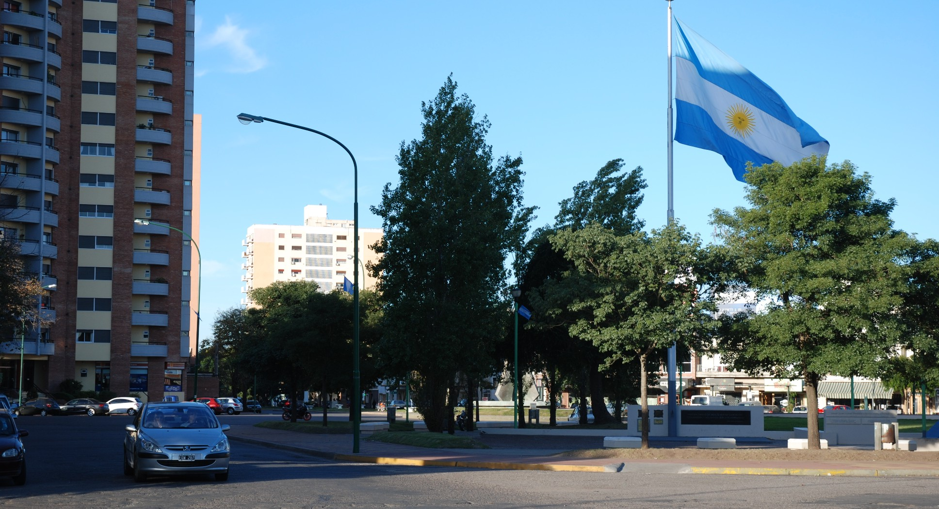 Avenida San Martín y Rivadavia. Junín, Argentina.